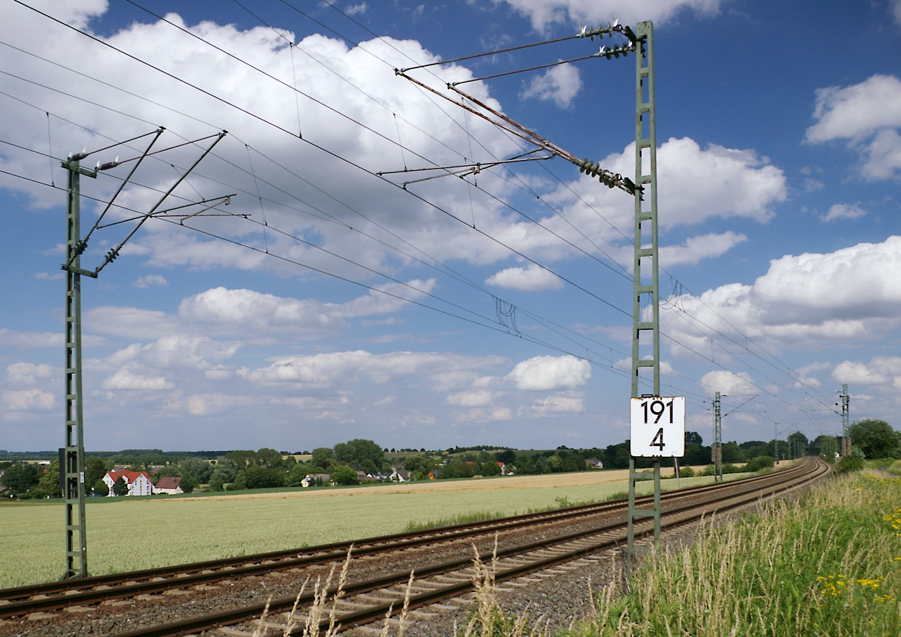 Y-Beiseile im Bereich von Fahrleitungsmasten. Überlappende Montage einer Oberleitung im Bereich einer Abspannung